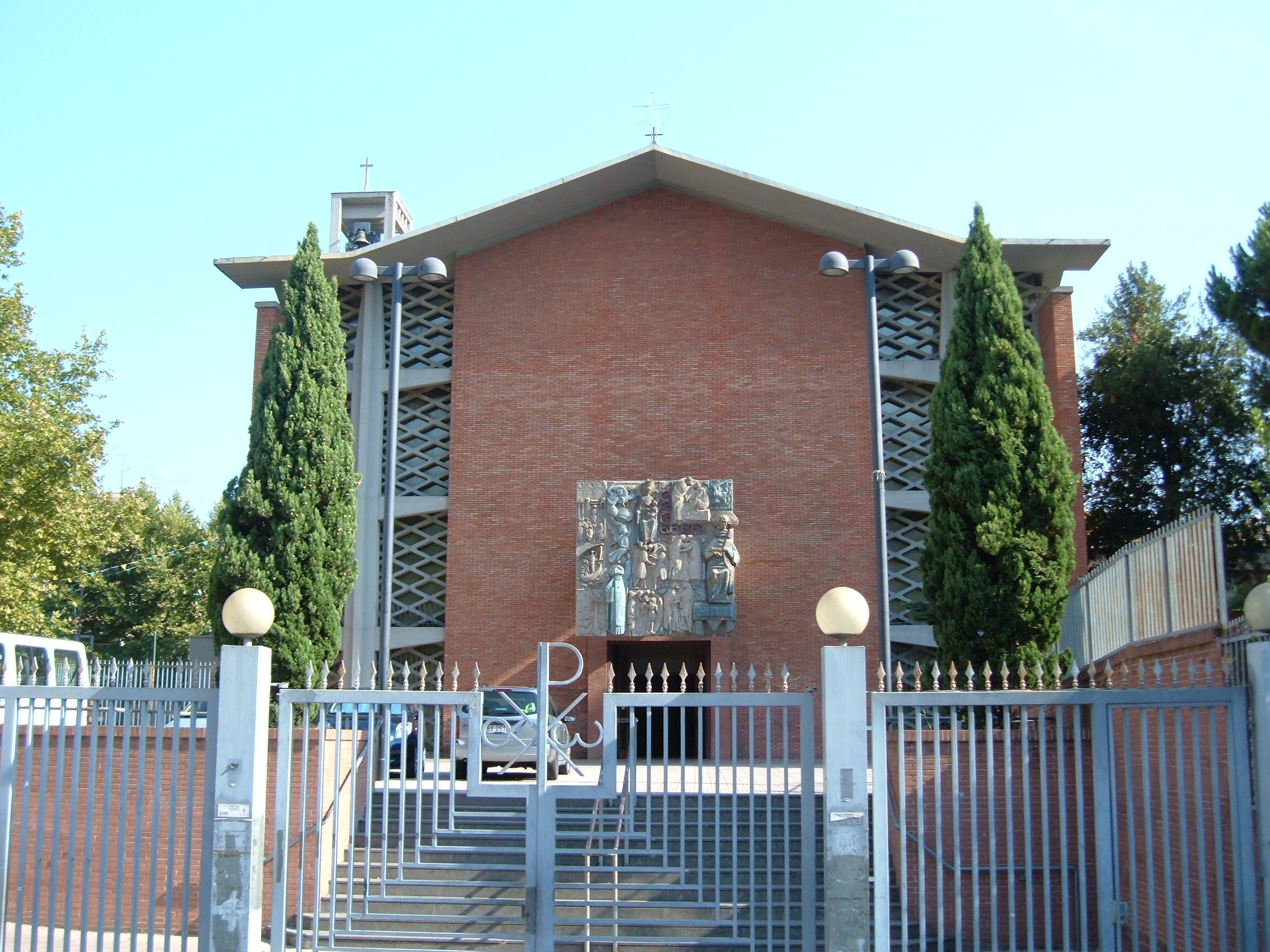 Chiesa di San Luca evangelista, a Roma, nel quartiere Prenestino-Labicano.